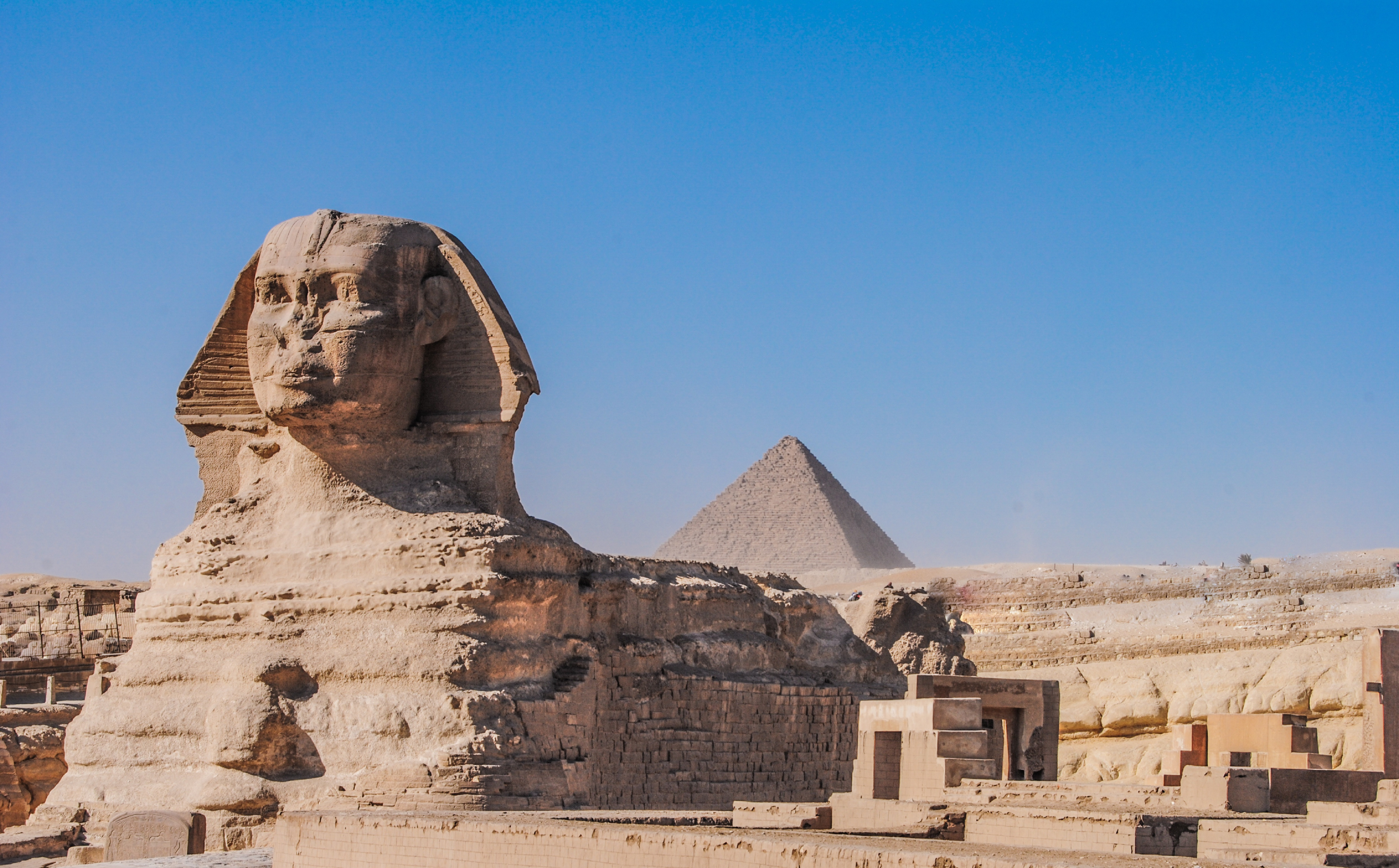 أبو الهول هو تمثال لمخلوق أسطوري بجسم أسد ورأس إنسان وقد نحت من الحجر الكلسي، ومن المرجح أنه كان في الأصل مغطى بطبقة من الجص وملون، ولا زالت آثار الألوان الأصلية ظاهرة بجانب إحدى أذنيه